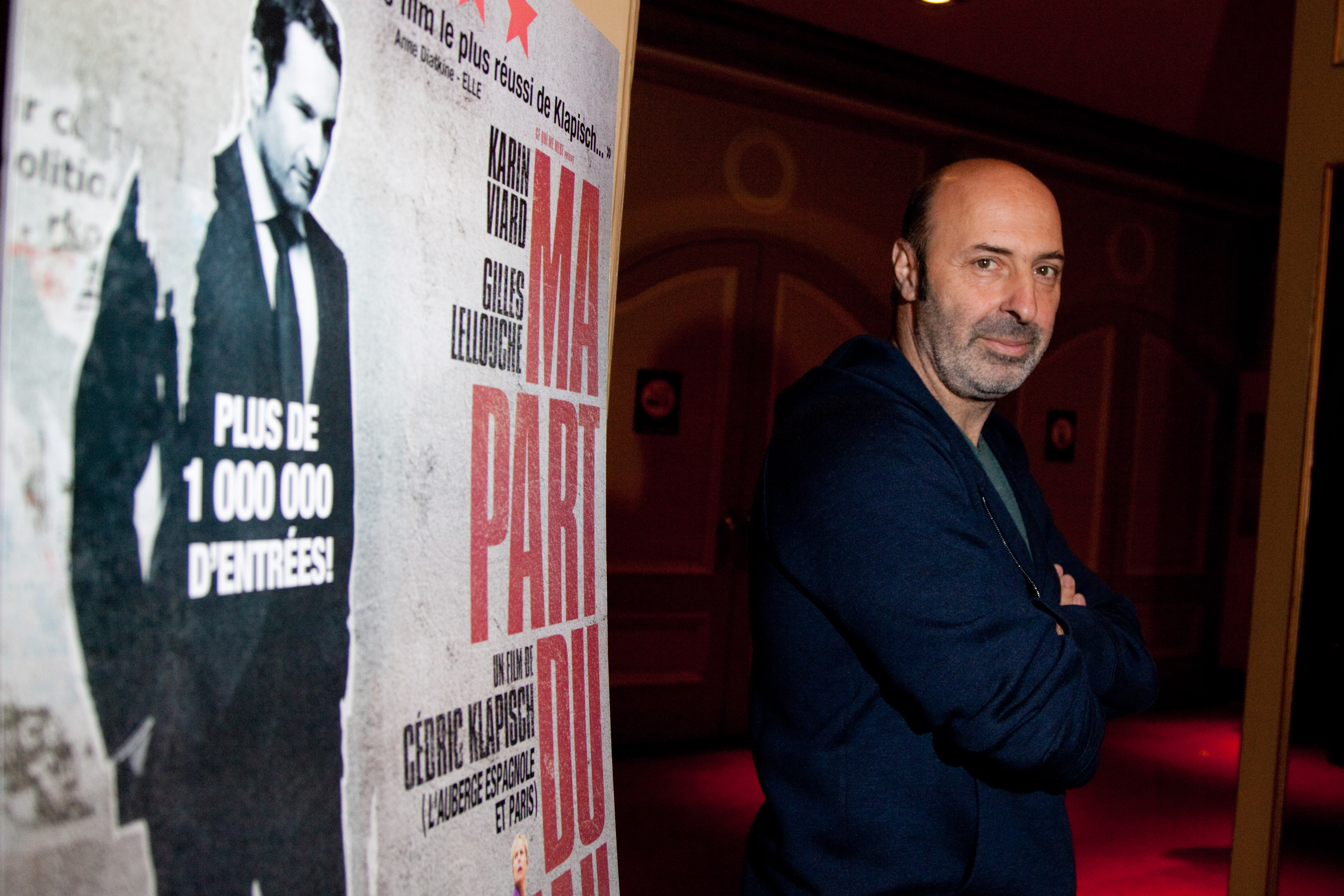 Cédric Klapisch Cinemania 2011